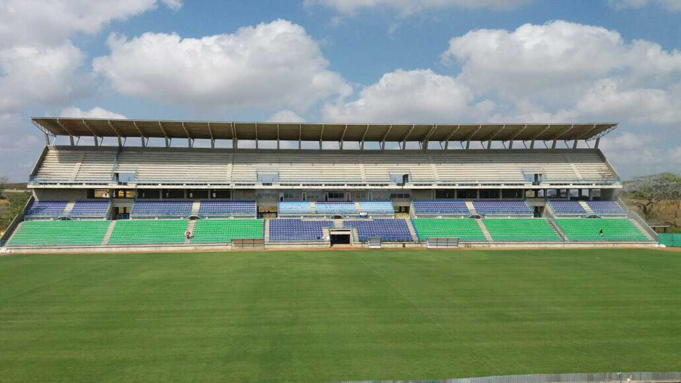 estadio